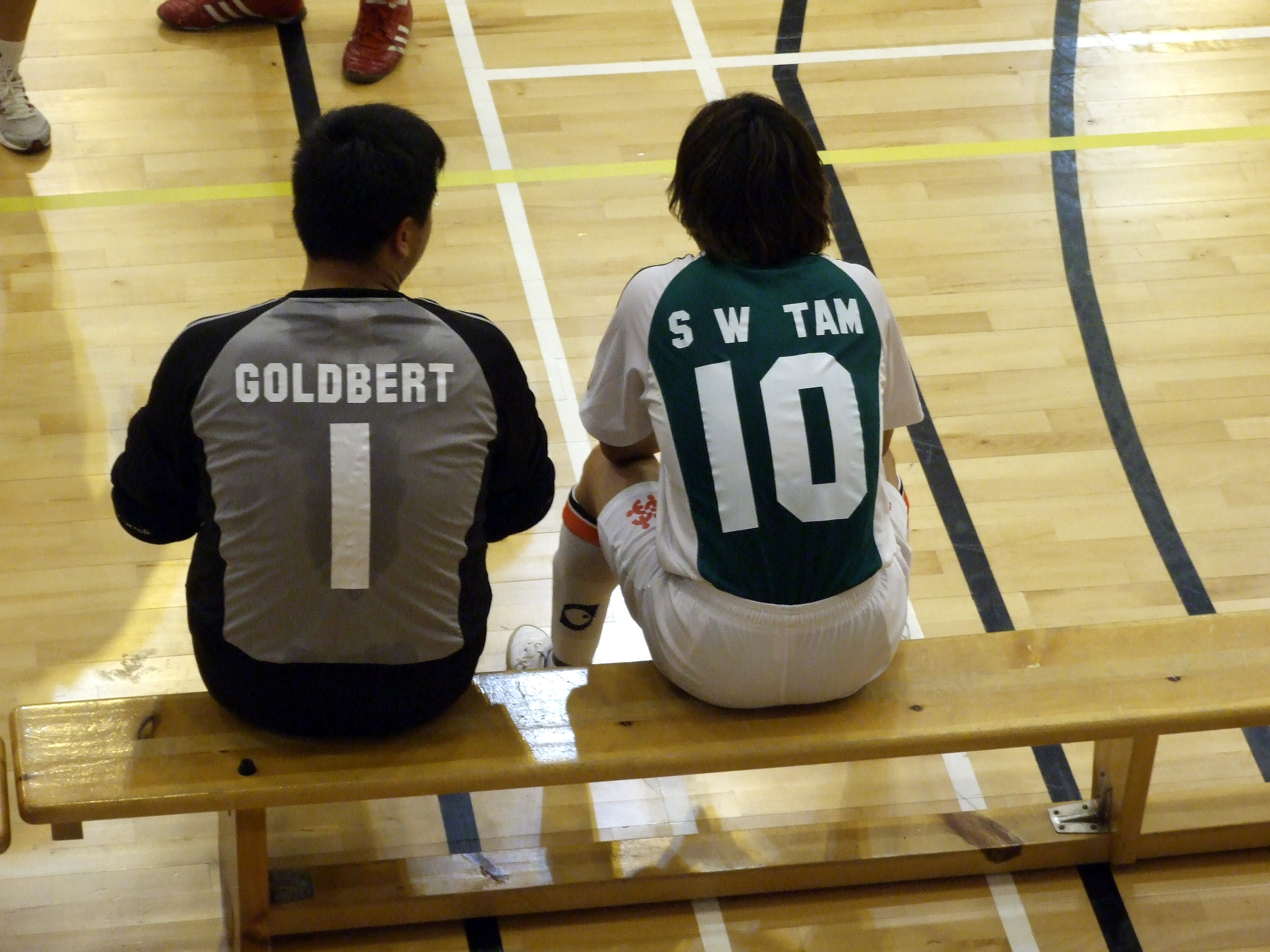 中文（香港）: 2011年全港運動會五人足球比賽東區星級戰將高志超和譚兆偉